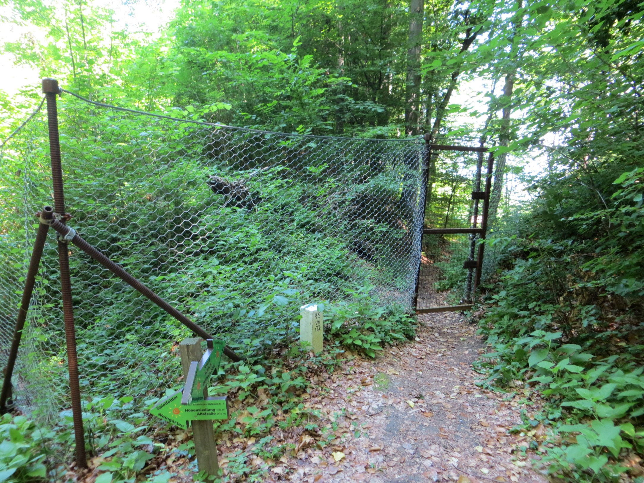 Ein im Zuge der Flüchtlingskrise 2015 von Österreich errichteter Grenzzaun an der Grenze zu Slowenien. Die Tore auf den Wanderwegen stehen offen.